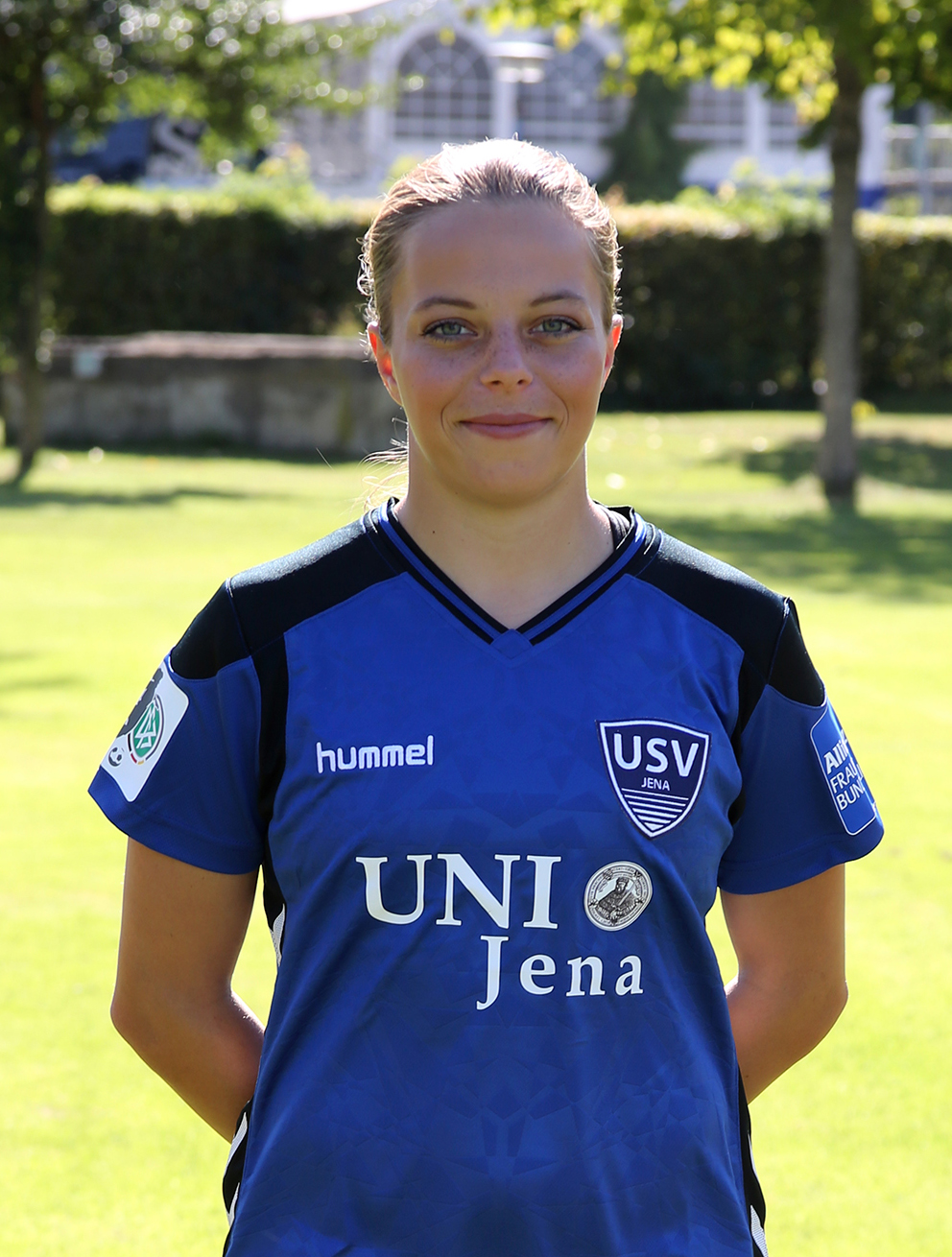 Marie-Luise Herrmann bei der Teamvorstellung des FF USV Jena